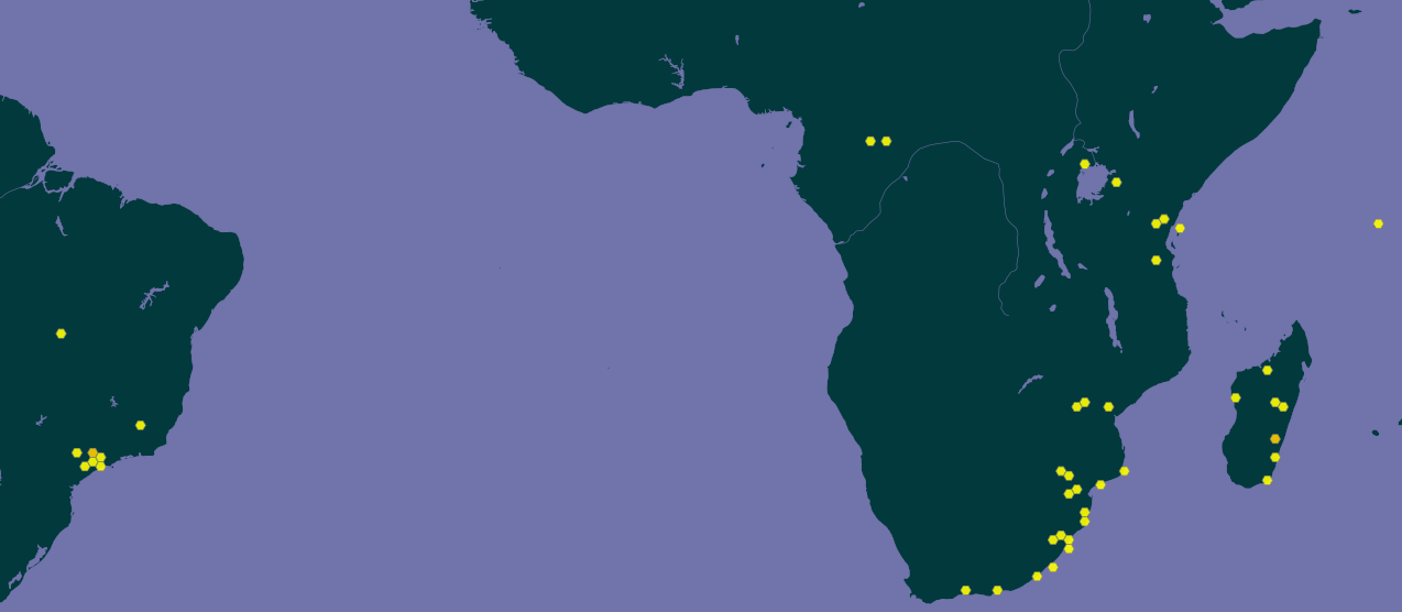 Mapa GBIF de distribuição do gênero Nephilingis.